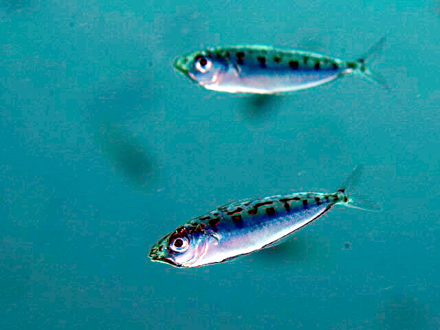 ヒメヒイラギ Equulites elongatus